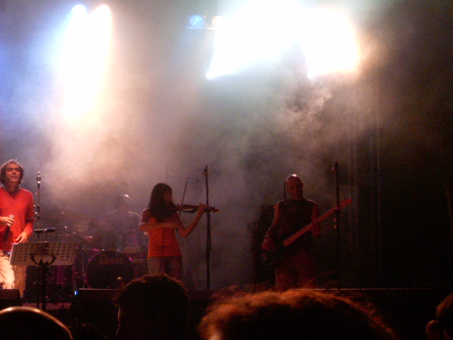 Quinta do Bill em concerto a 2 de Julho de 2005, em Escudeiros, Braga